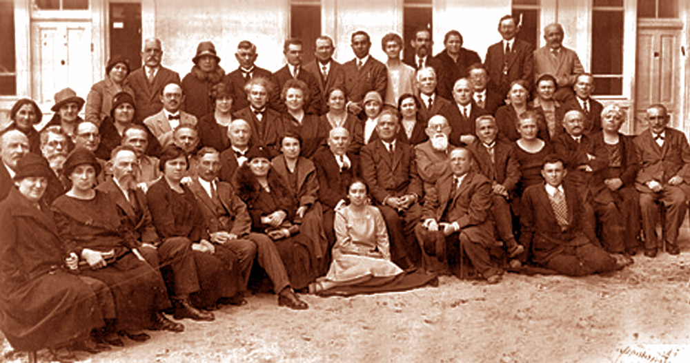 שיפוץ לצילום ישן של חברי אגודת אחוזת בית. נציגי 60 משפחות מייסדי תל אביב בתמונה משותפת ב-1929 בעת שמלאו לתל אביב 20 שנה. במרכז המייסד עקיבא אריה וויס ובשרוה למטה ביתו אחוזה בית וויס